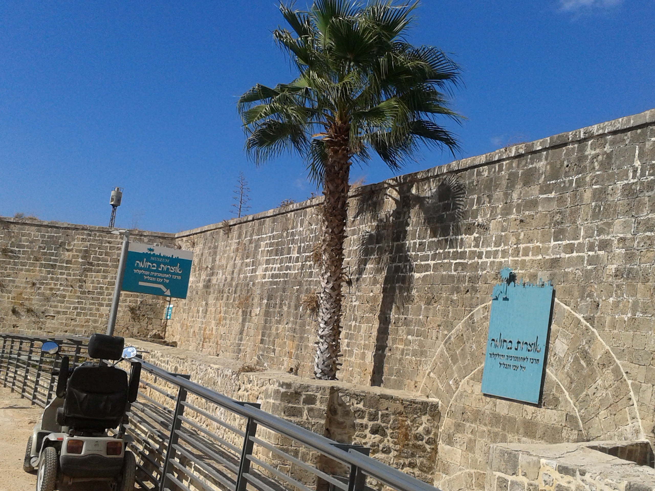 מוזיאון אוצרות בחומה, בעיר העתיקה של עכו.